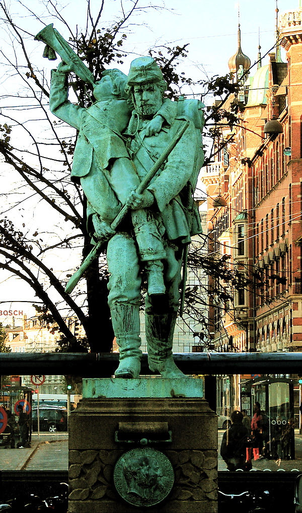 Landsoldaten med den lille hornblæser, bronze, H.P. Pedersen-Dan og B. Fischer, 1899, København